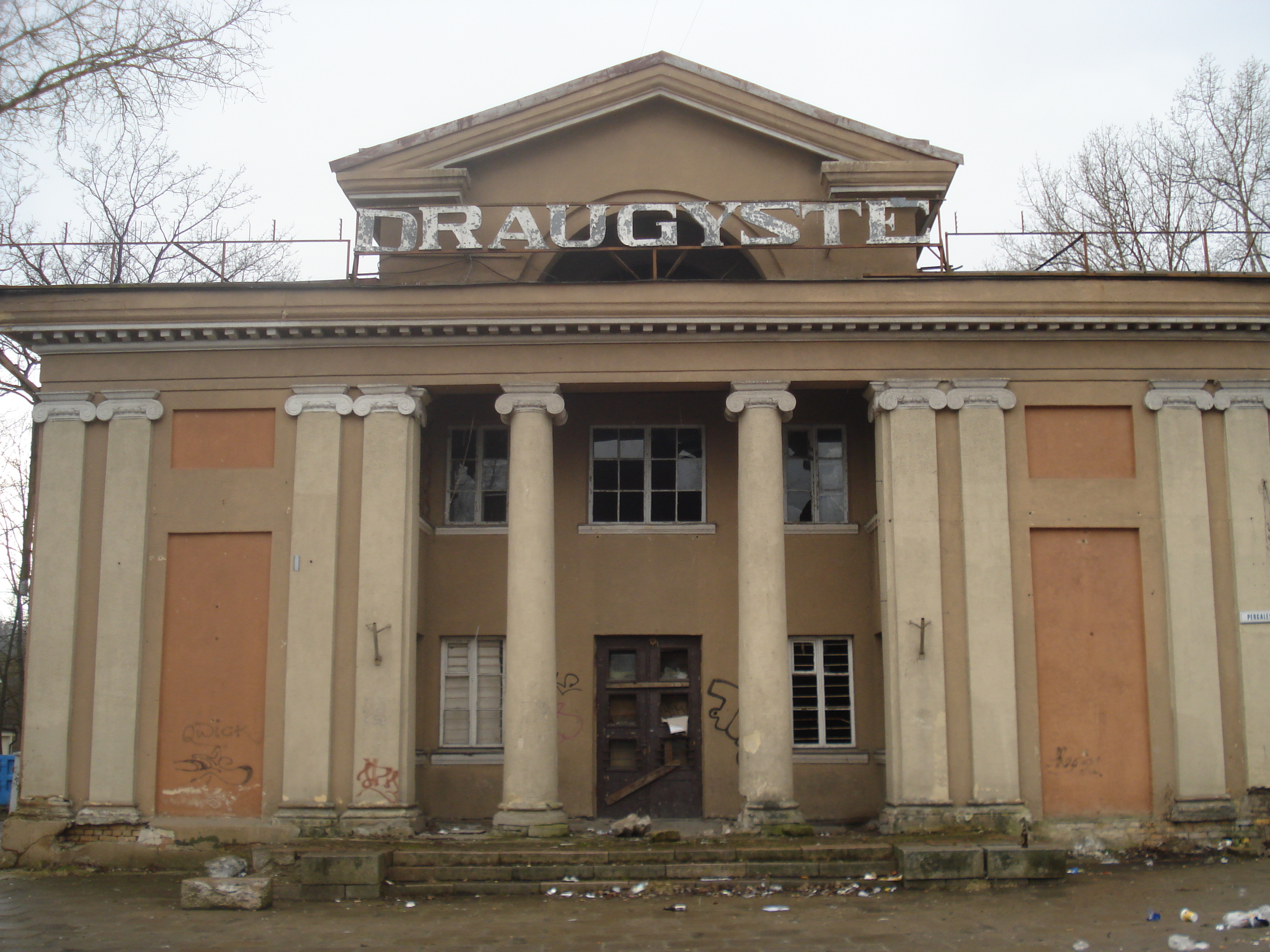 Former cinema Drausgystė in Vilnius (Naujoji Vilnia). 1949. Pergalės g. 1 / Stepono Batoro g. 43